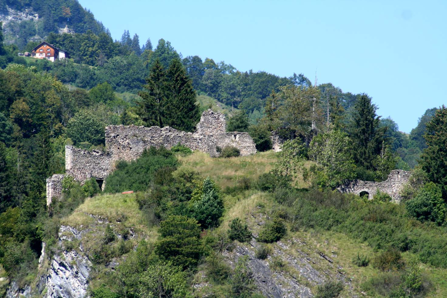 Burg Solavers, Ansicht von Süden